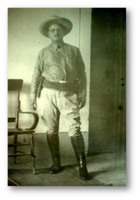 El General Alberto B. Gutiérrez en uniforme de campaña, en Guadalajara, Jalisco una vez terminada la Revolución Cristera.